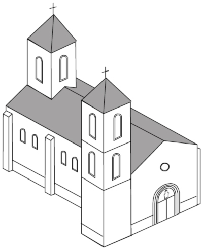 Iglesia de San Miguel (Tudela), desaparecida; reconstrucción del edificio para principios del siglo XIX.